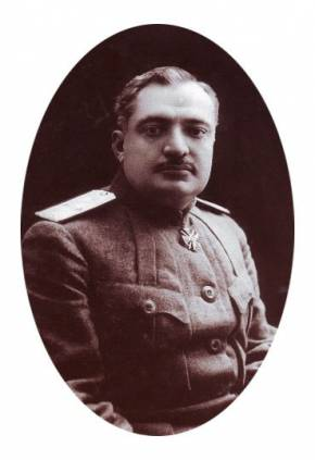 Олександр Петрович Фіцхелауров (Піцхелаурі. груз. ალექსანდრე პეტრეს ძე ფიცხელაური) (8 червня 1878, Новочеркаськ — 28 березня 1928, Париж) — учасник подій 1917—1921 років на боці білогвардійського руху, генерал-лейтенант, один з керівників Білого руху на Дону.